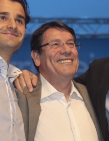 Eduardo Dolón (izquierda, candidato a alcalde por el PP) y Pedro Hernández Mateo (derecha, alcalde saliente) en un mitin en Torrevieja en mayo de 2011, durante la campaña electoral de las municipales de 2011